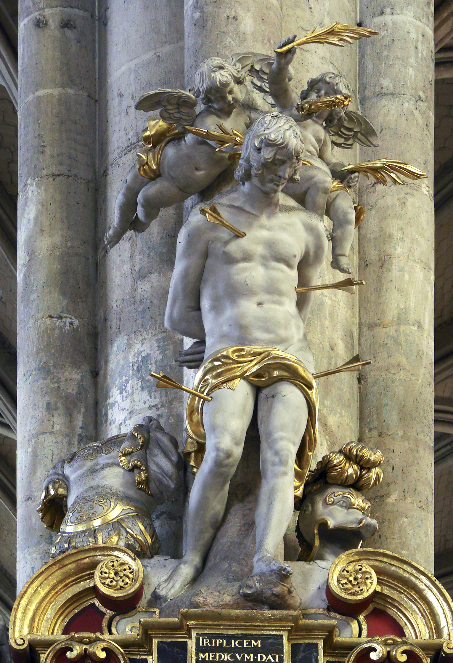 Chapelle Saint-Sébastien de la cathédrale d'Amiens, décorée par Nicolas Blasset en 1634: la statue de Saint Sébastien au sommet.